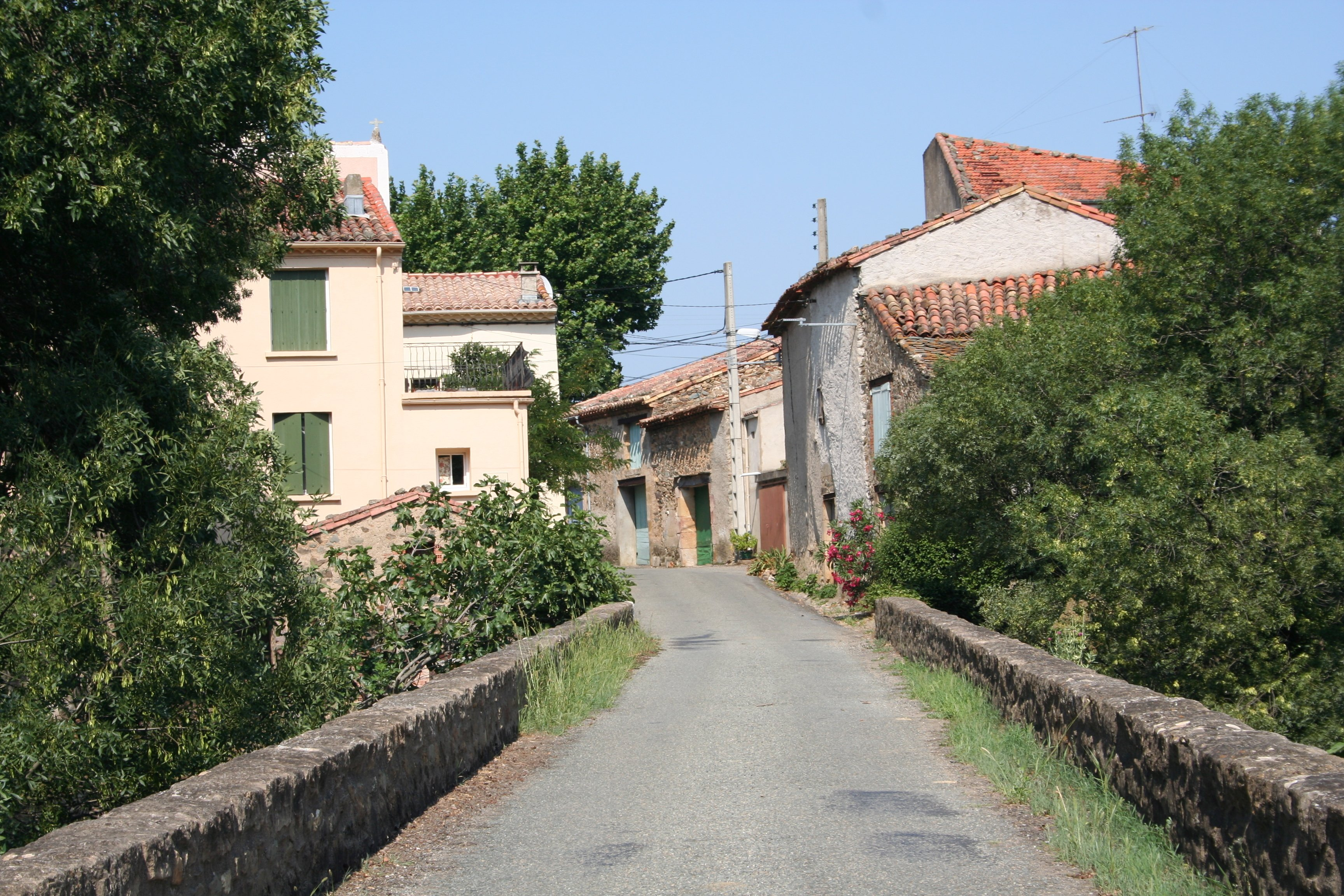 Ruelle de Donnadieu, commune de Babeau-Bouldoux, Hérault, France.